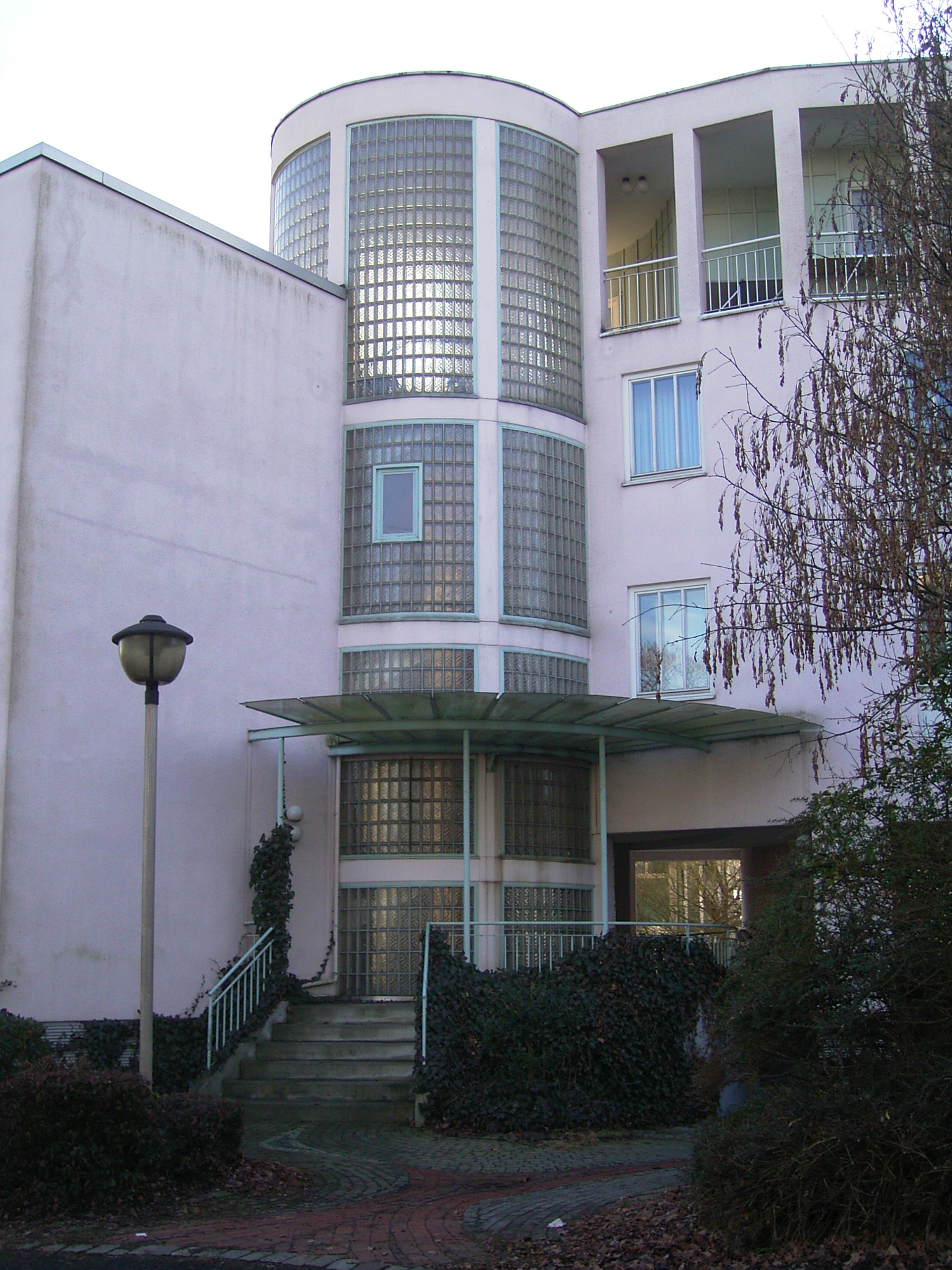 documenta urbana Wohngebäude in Kassel 1979-1982. Erschließung der „Wohnschlange“ Hilmer und Sattler.